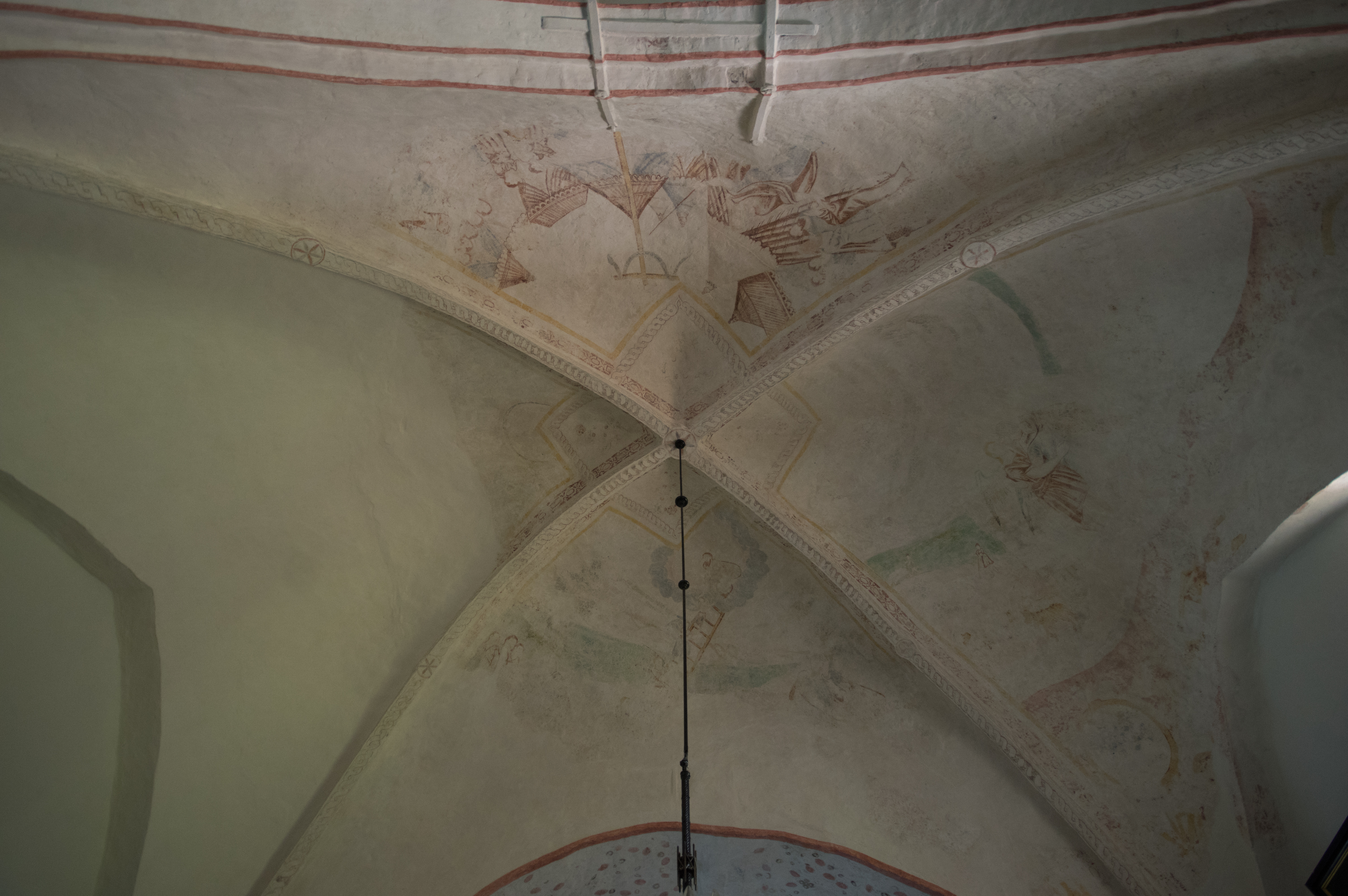 Thumby in Schleswig-Holstein. Die Kirche im Ortsteil Sieseby steht unter Denkmalschutz.